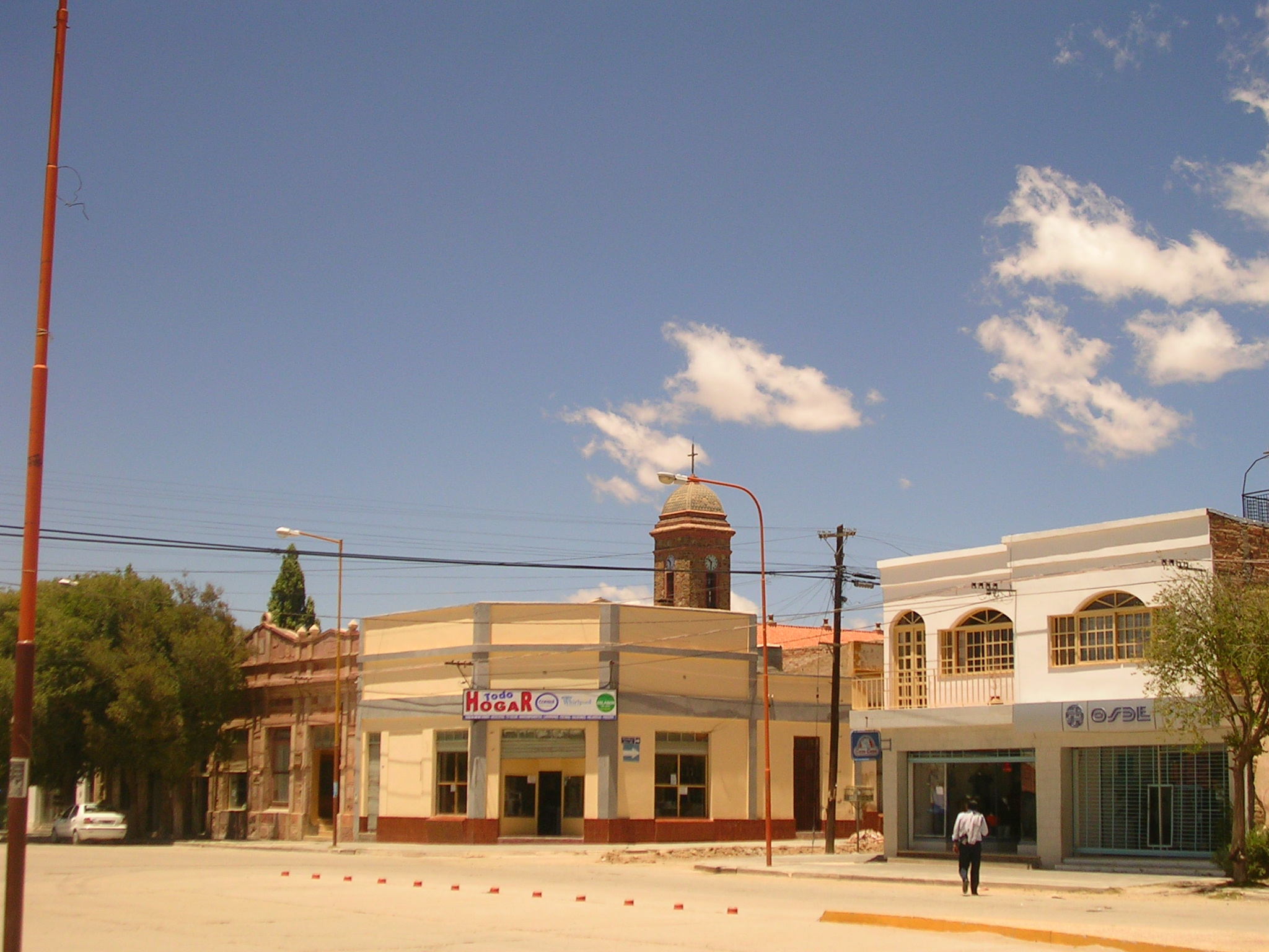 La Quiaca (Argentina)